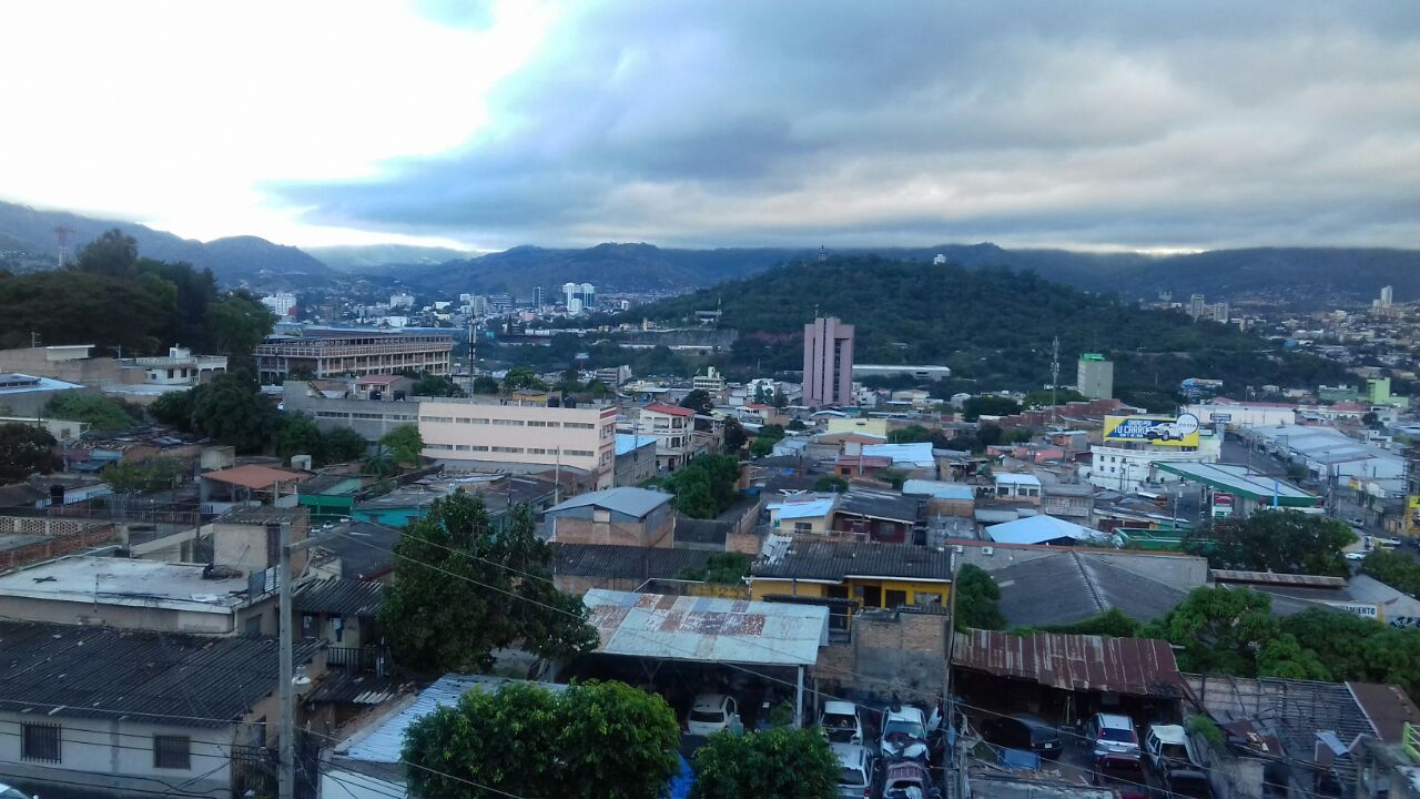 Tegucigalpa